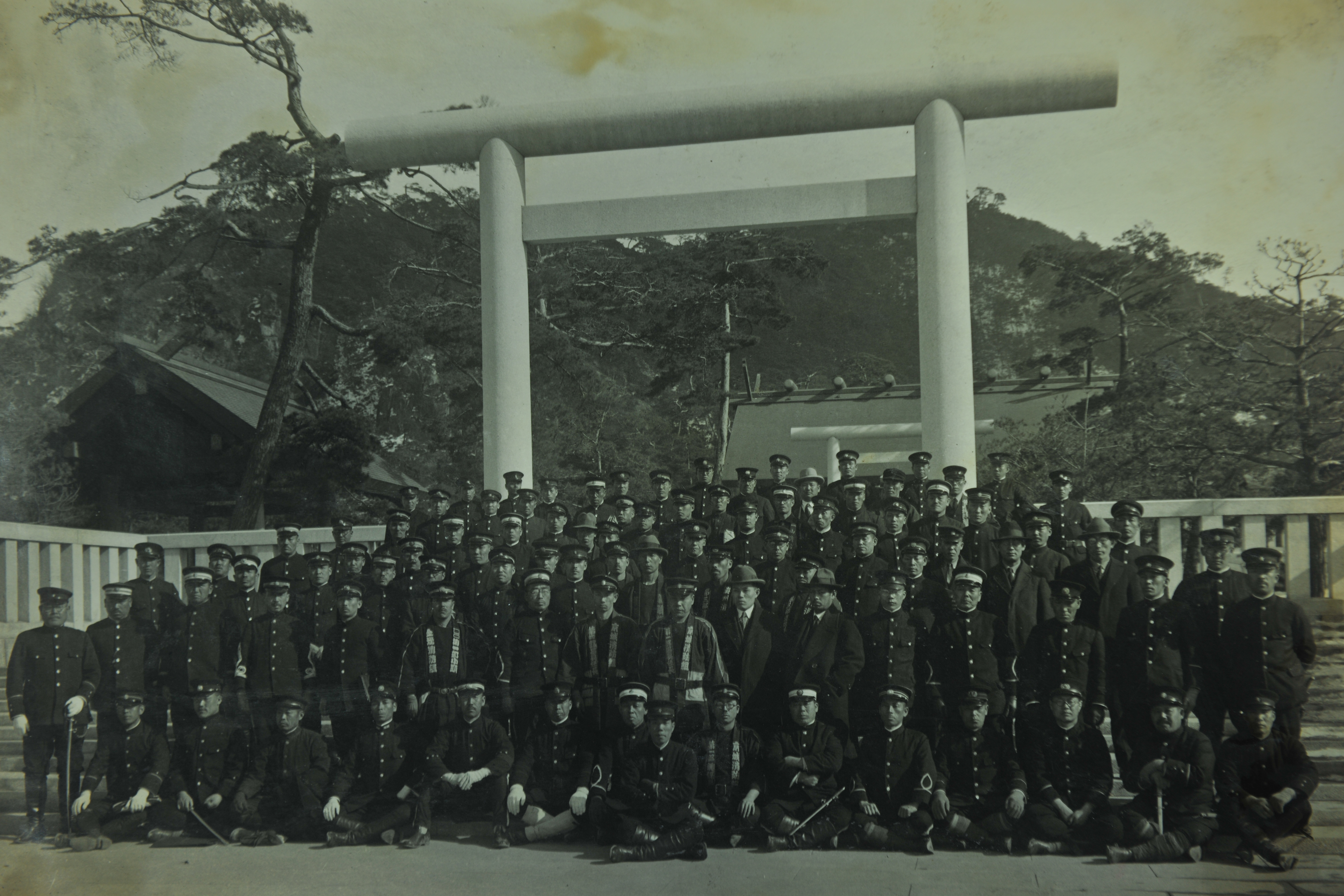 서울특별시 소방재난본부 소장 사진. photos of Seoul Metropolitan Fire & Disaster Headquarters. 이 파일은 크리에이티브 커먼즈 저작자표시-동일조건변경허락 4.0 국제 라이선스로 배포됩니다. 단 누구인지 구별 가능한 특정 인물이 사진에 포함되어 있을 경우 사용 전에 서울특별시 소방재난본부 및 해당 인물의 승인을 받으셔야합니다. 감사합니다. evidence of permission